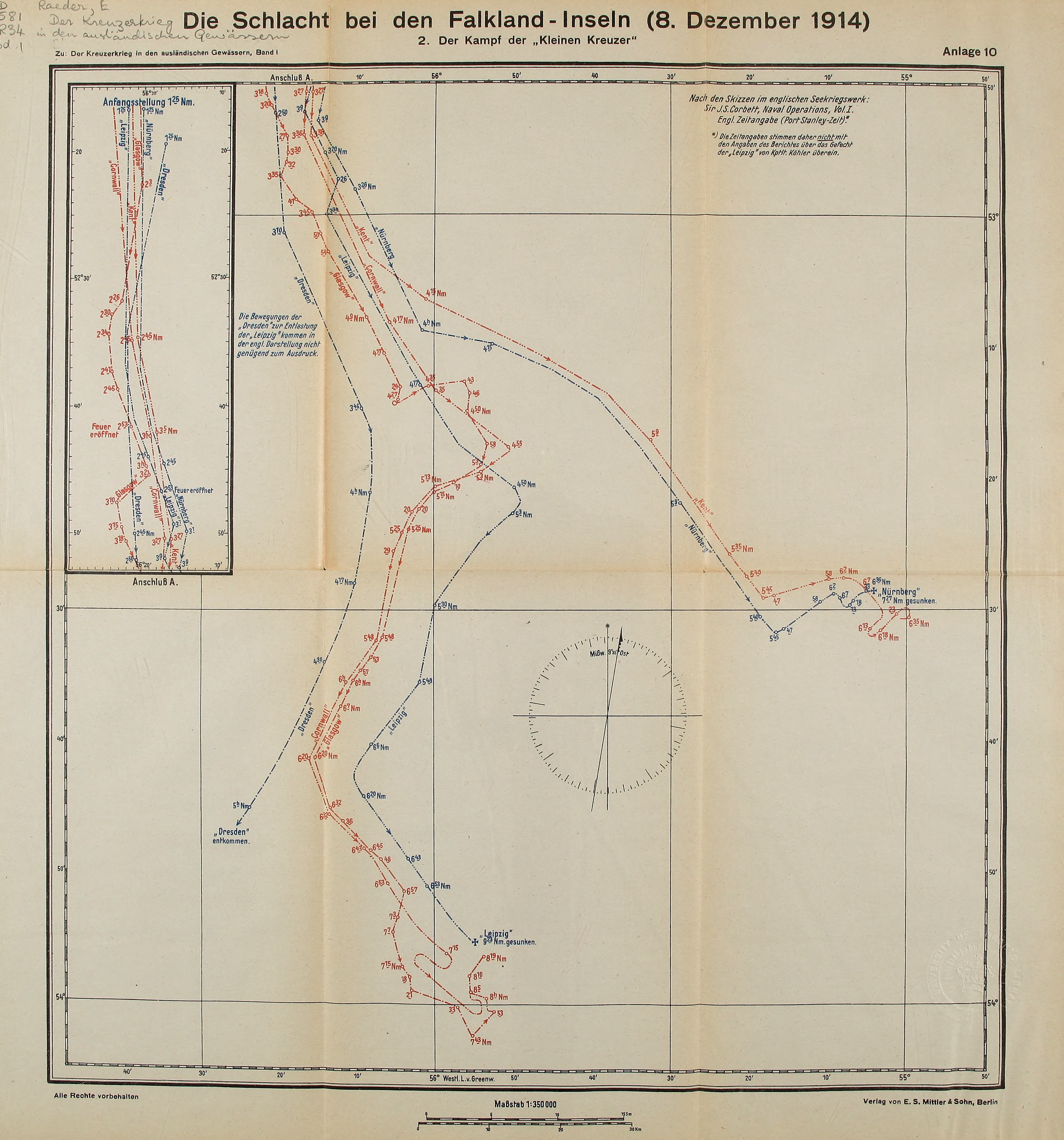 Schlacht bei den Falkland-Inseln (8. Dezember 1914), 2. Der Kampf der Kleinen Kreuzer